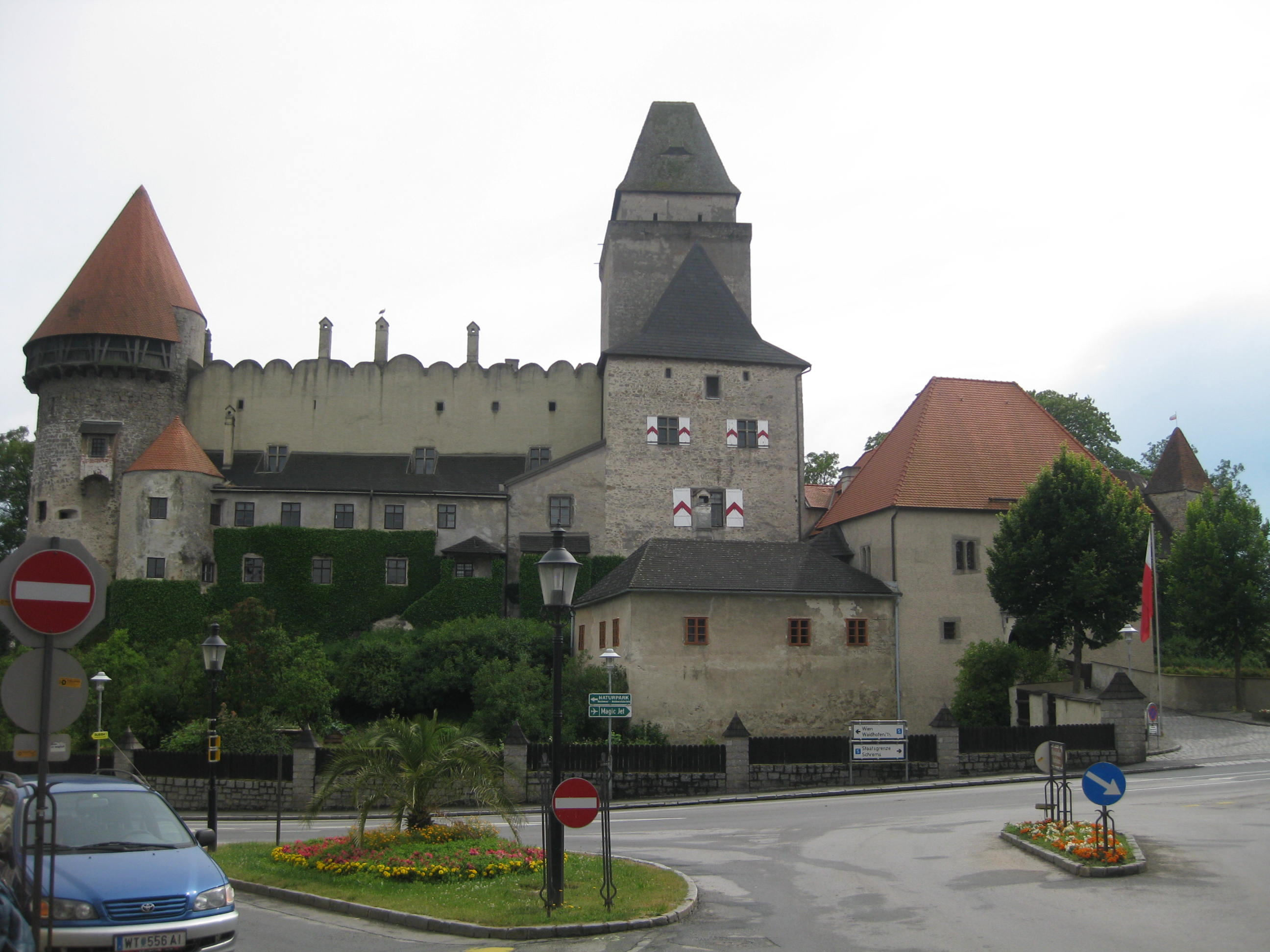 Hrad Heidenreichstein v Rakousku